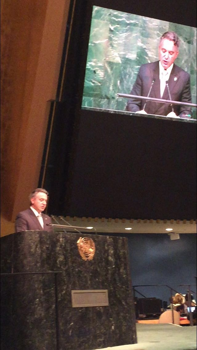 Ministro de Salud ante ONUSIDA